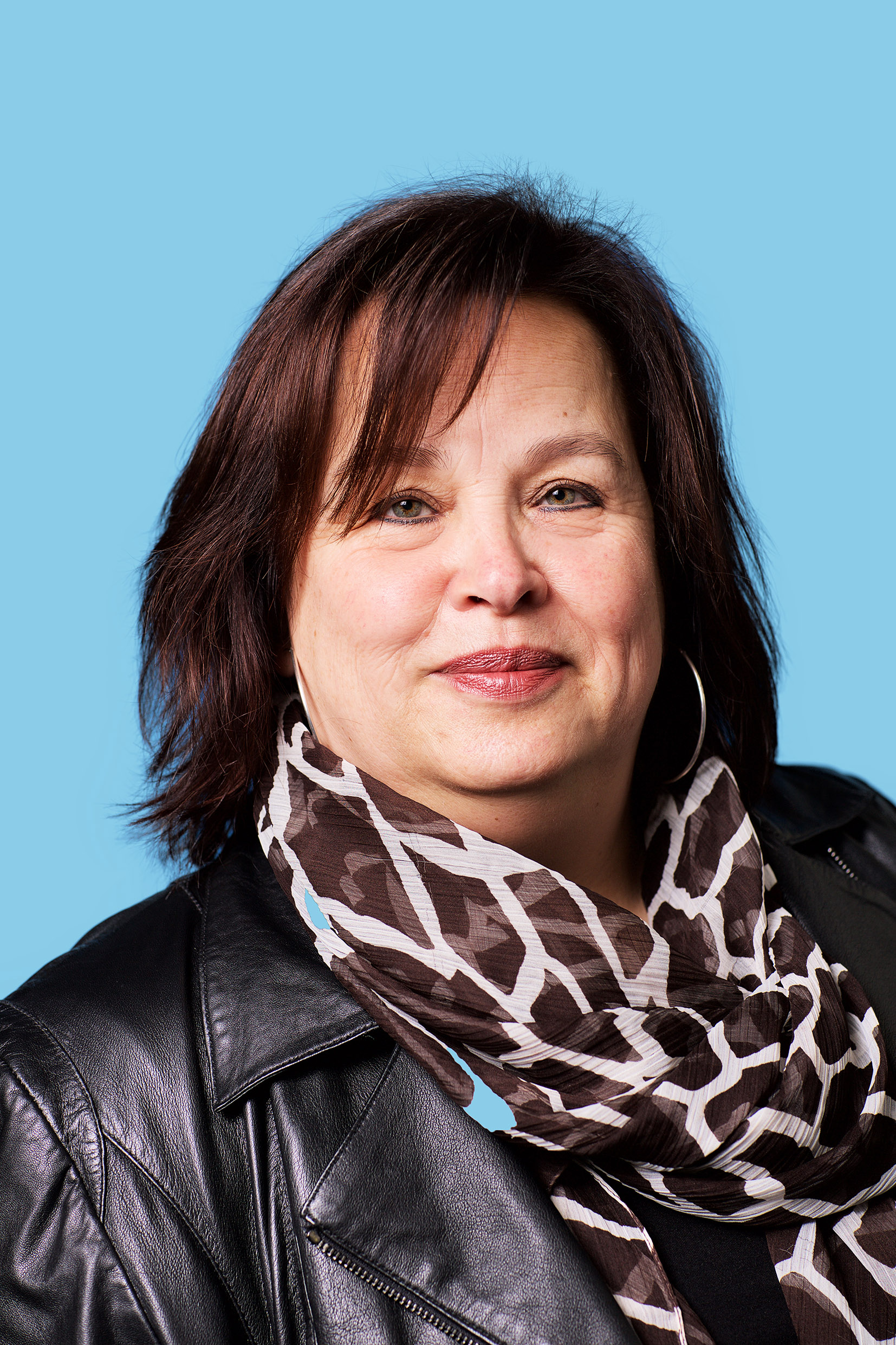 13 februari 2016. Tweede Kamerlid voor de Partij van de Arbeid. Foto: Lex Draijer.